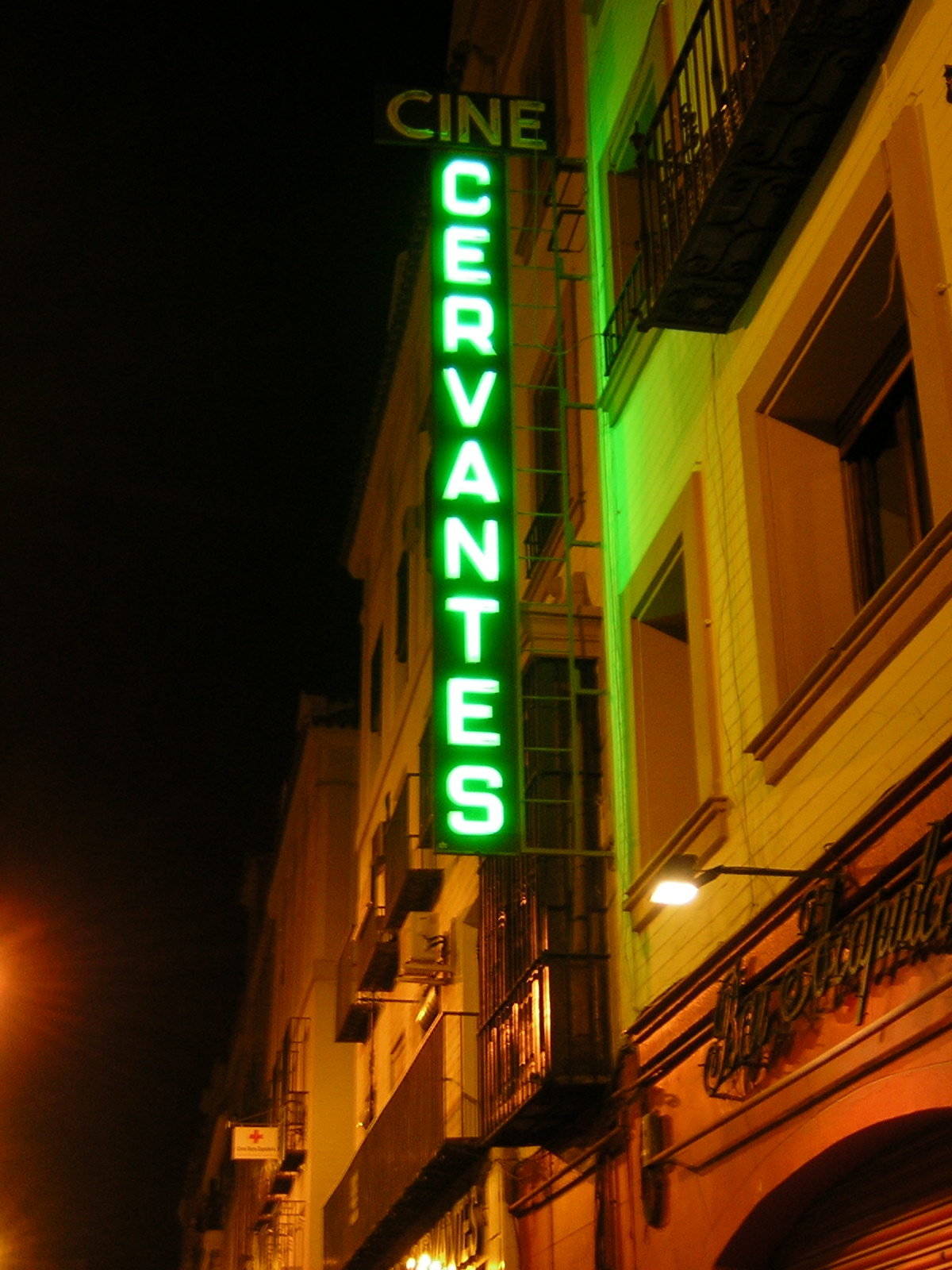 Rótulo luminoso del cine Cervantes en Sevilla